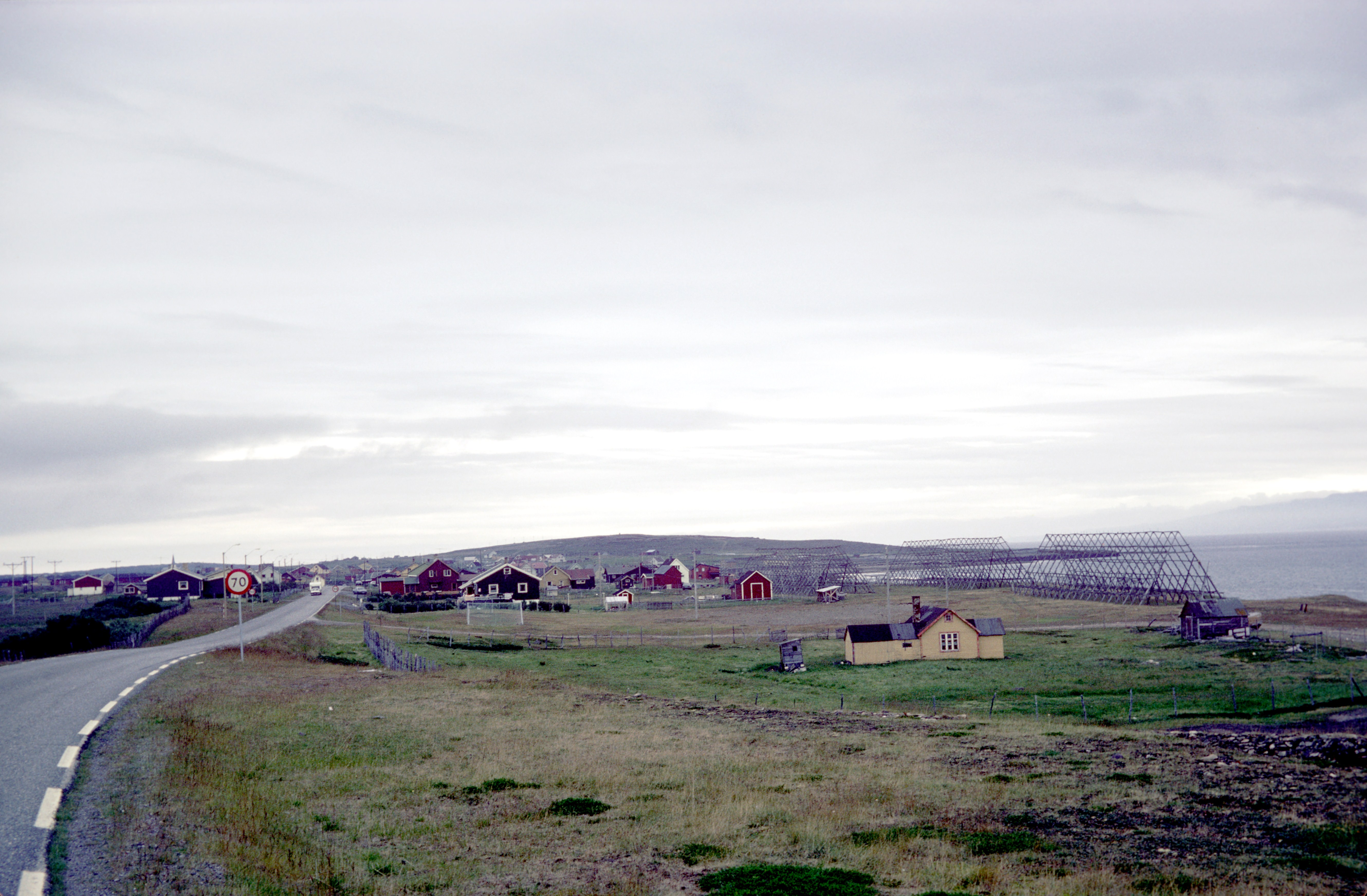 L' entrée du village de Vestre Jakobselv en arrivant de Varangerbotn. Sur la droite, on peut remarquer trois grands séchoirs triangulaires à poisson. Vestre Jakobselv est situé sur l' E75 (route 98) et à l' embouchure de la rivière de Jakob (Jakobselva). Vestre Jakobselv, Vadsø kommune, Finnmark, Norvège.